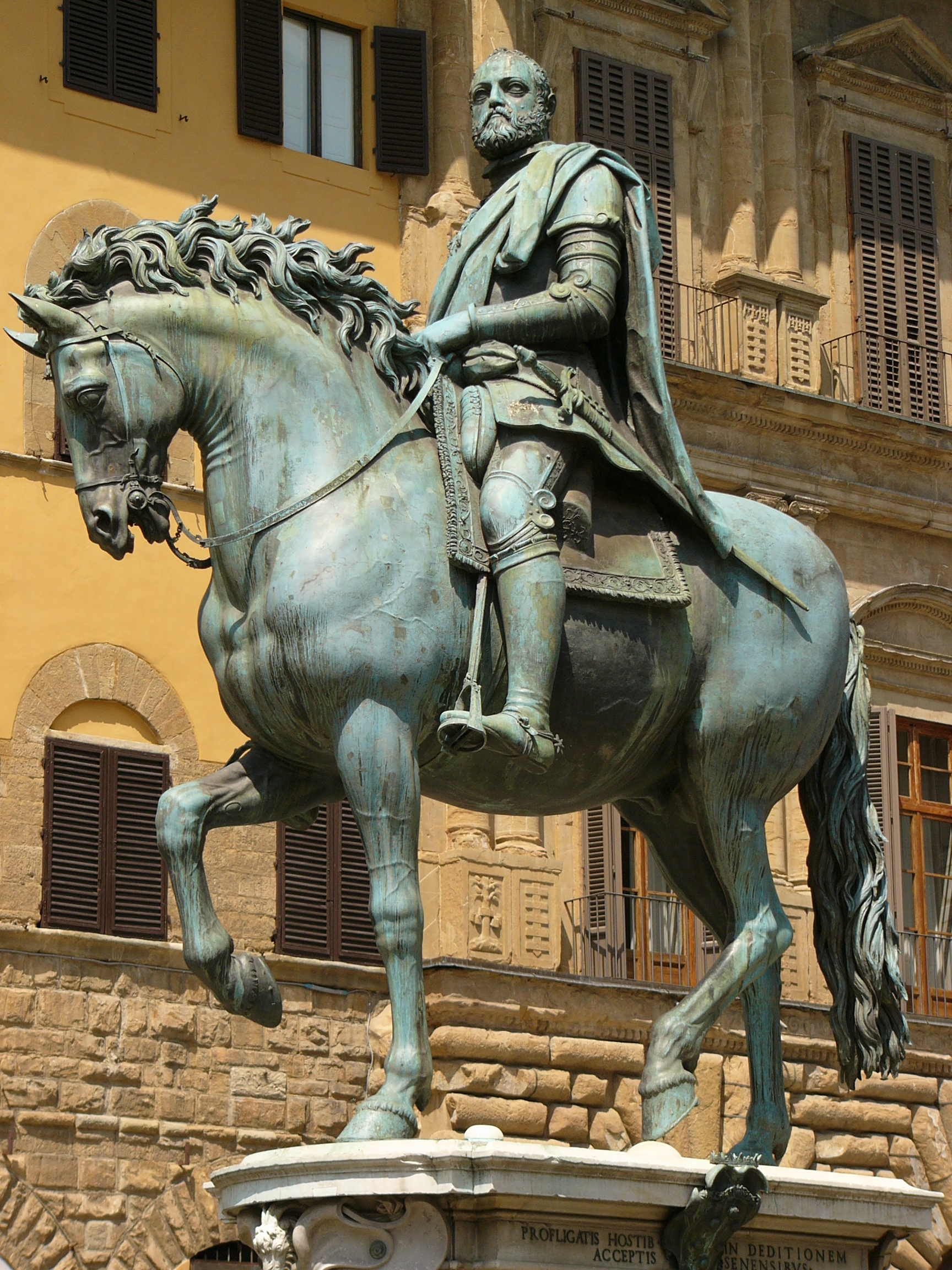 ruiterstandbeeld van Cosimo I de' Medici